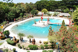 garzaroja panoramica